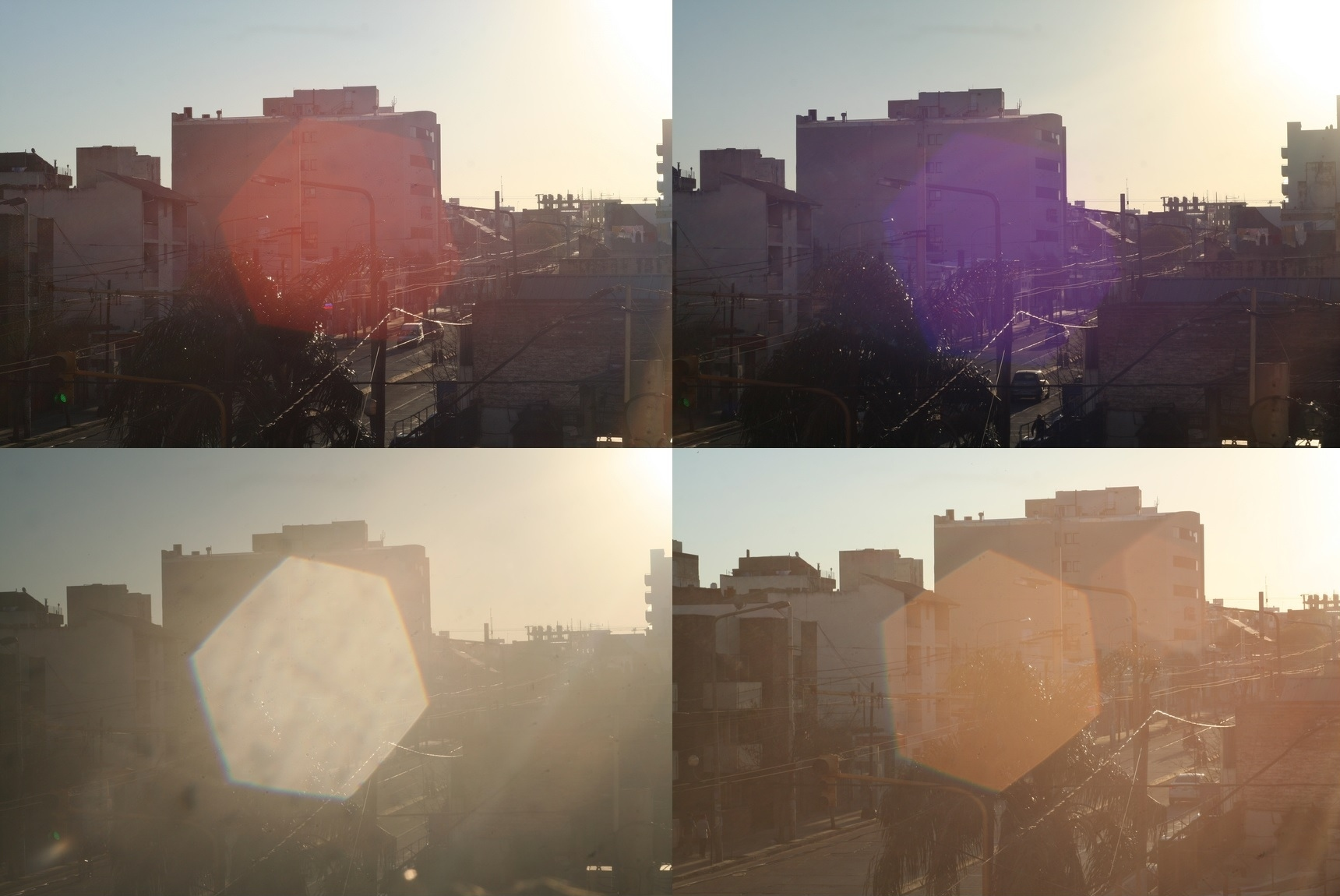 Helios-44. Los multirecubrimientos diferentes muy frecuentes (que producen dintintos grados de flare y fantasmas de muy distintos colores)